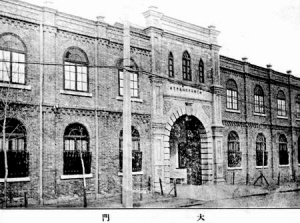 始建于1906年的北洋女师范学堂大门